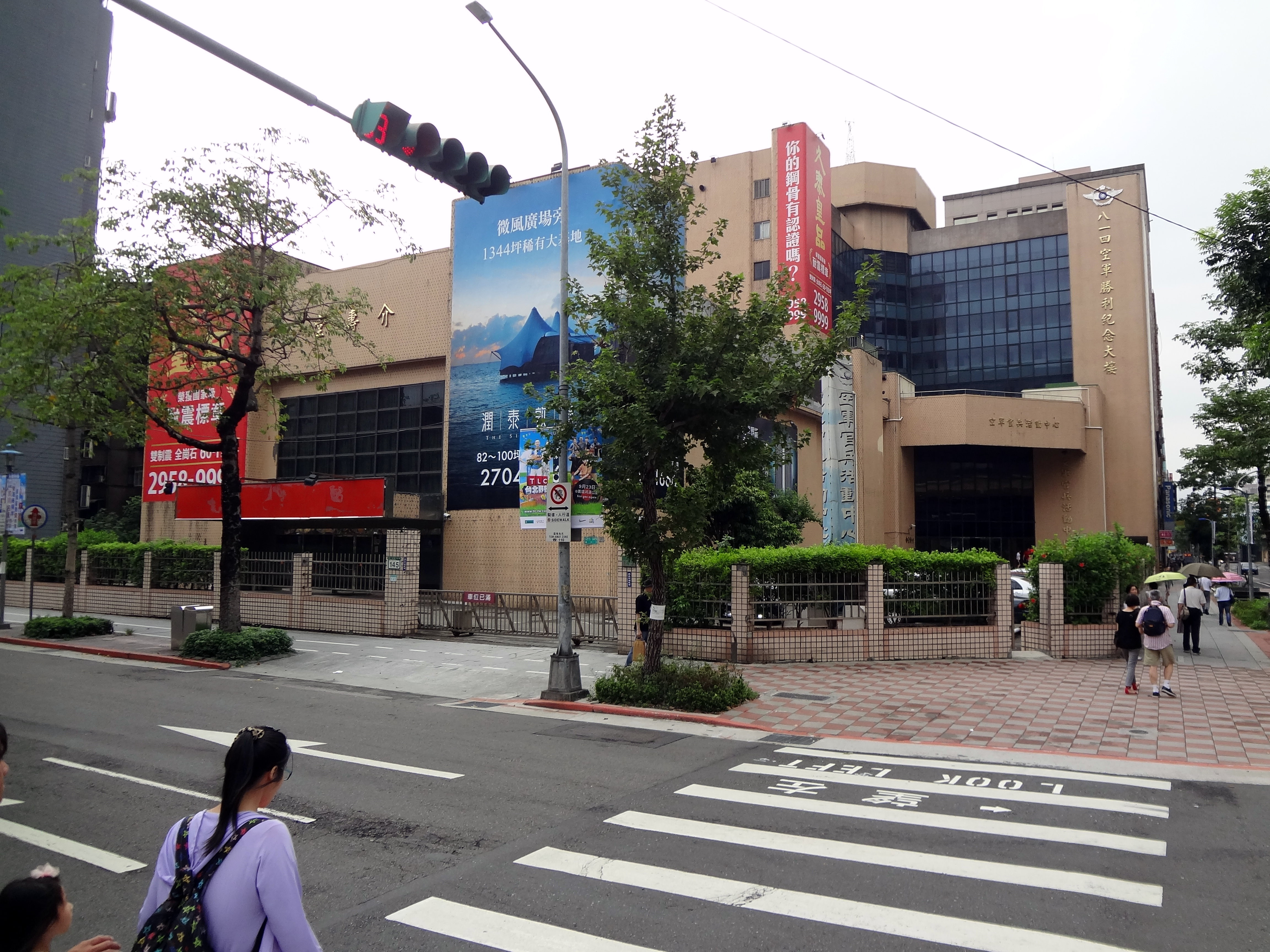 八一四空軍勝利紀念大樓（臺北空軍官兵活動中心），位於臺北市大安區仁愛路三段145號。